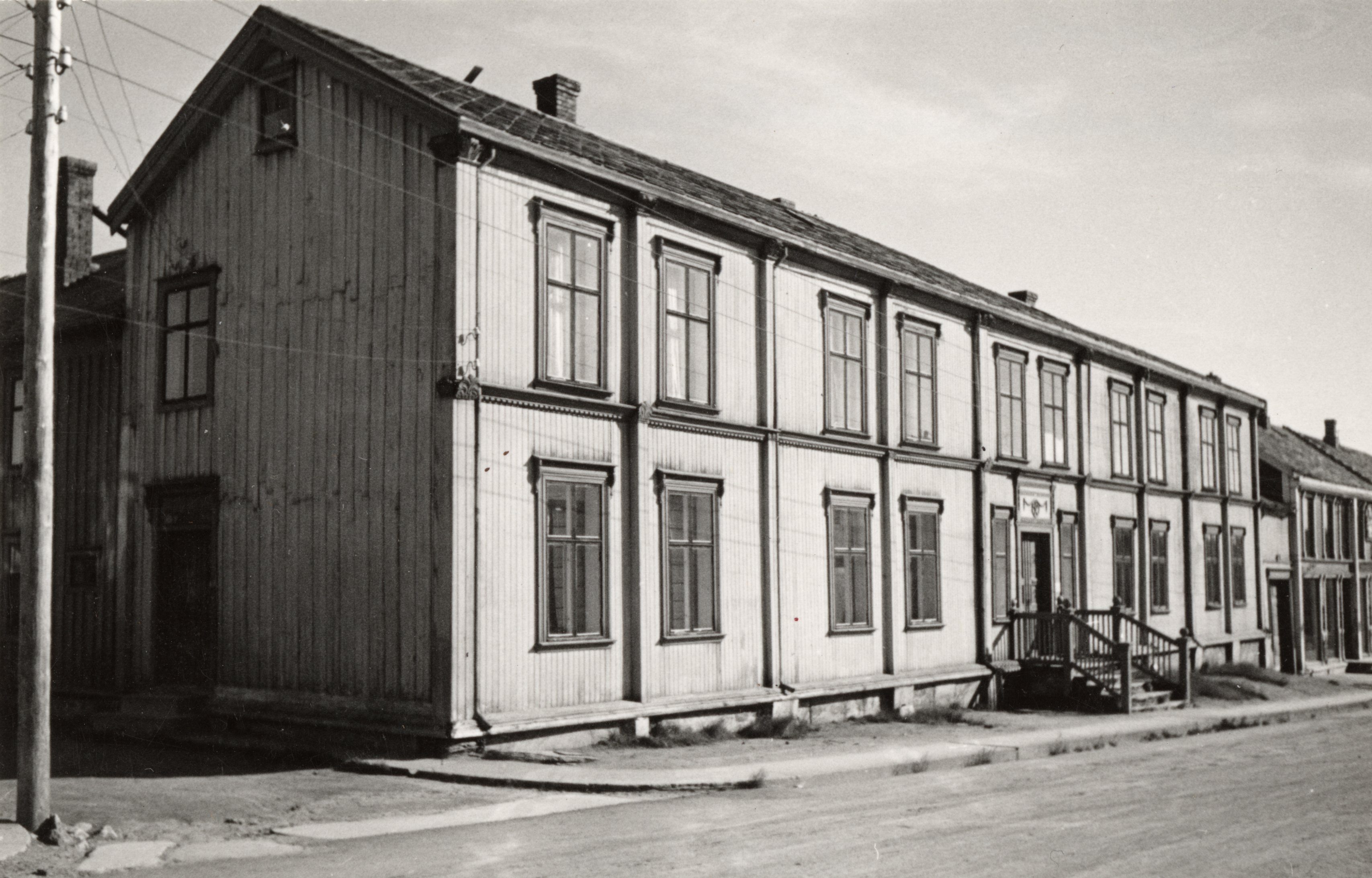 Direktørgården i Røros by, Sør-Trøndelag This image on crowdsourcing geotagging platform Fotodugnad